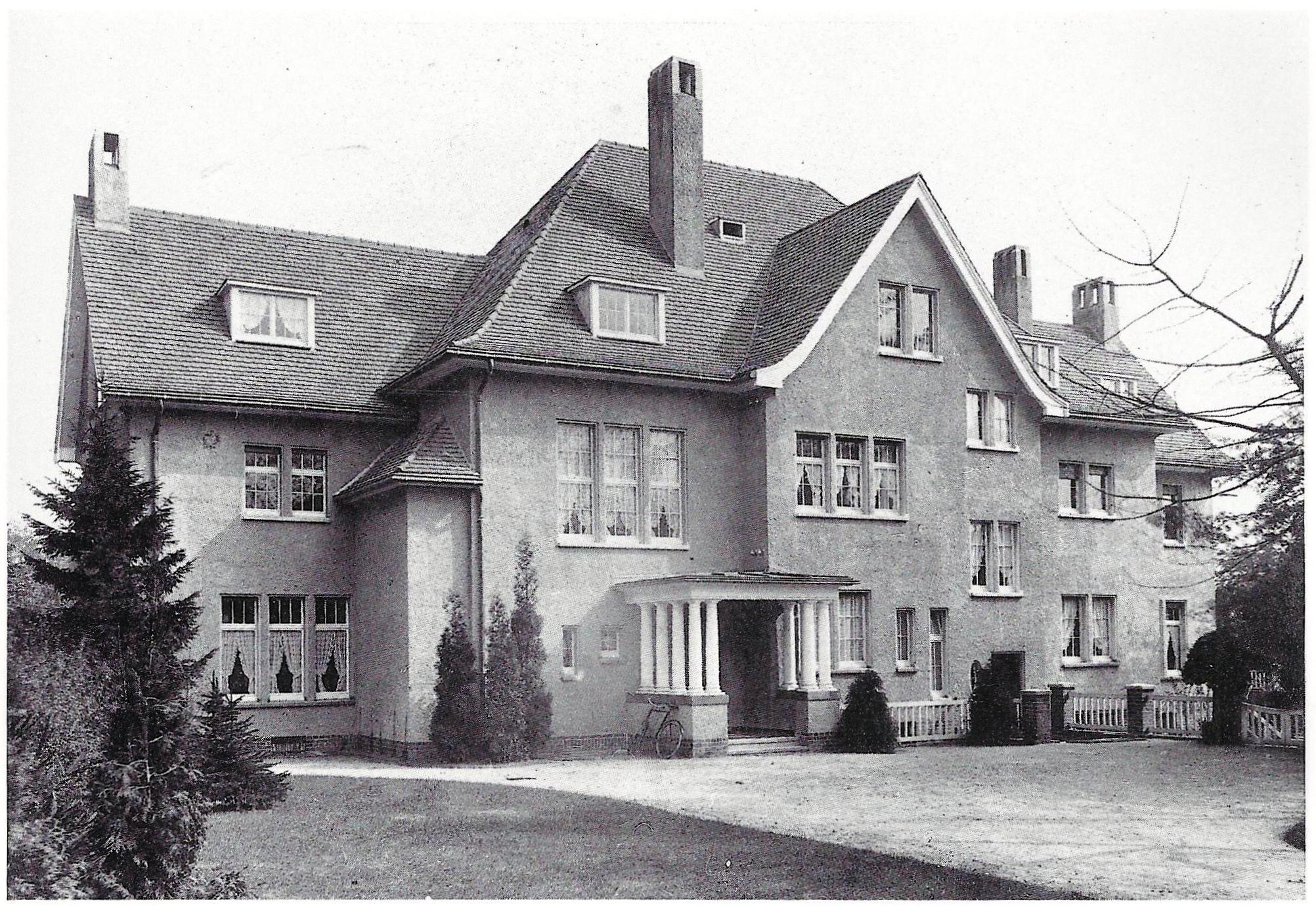 Villa Dr. Hervey Cotton Merrill, Parkstraße 61, Köln-Marienburg: Nordseite